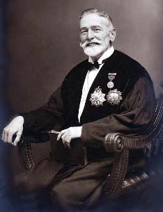 Don Ramiro Alonso de Villapadierna, González-Viejo y Padierna , Subsecretario de Gracia y Justicia, España